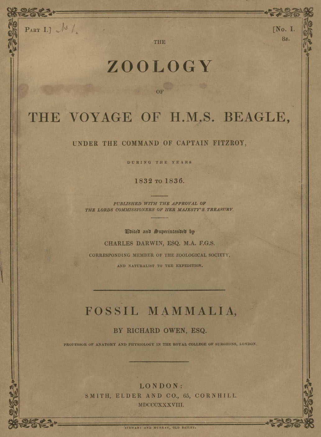 Titelblatt des 1. Teiles des 1. Bandes der Zoology of the Voyage of H.M.S. Beagle